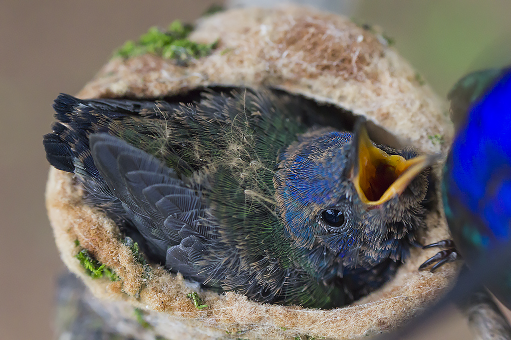 Local: Araçatuba/SP - Brasil Espaço Interação Bioma: Mata Atlântica Acessórios: Tripé + Cabo Disparador Remoto